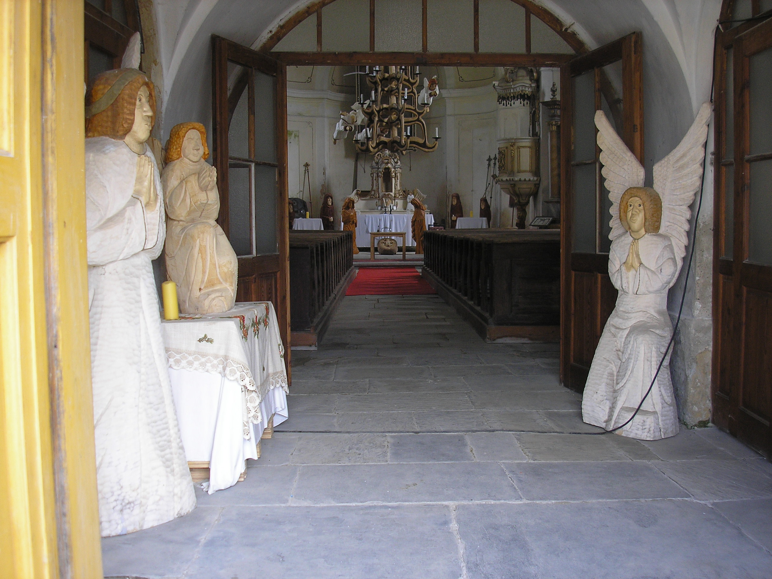 Interiér kostela v Jiříkově na Bruntálsku.